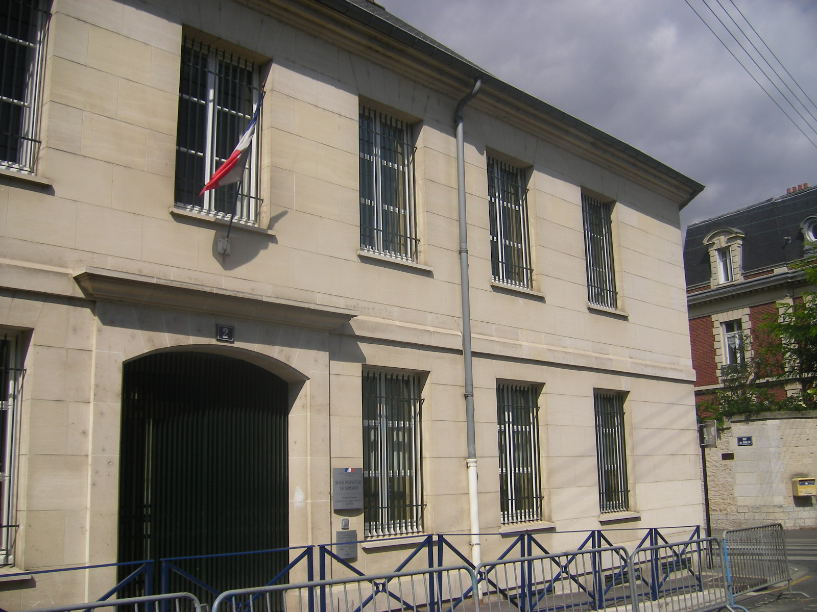 Soissons